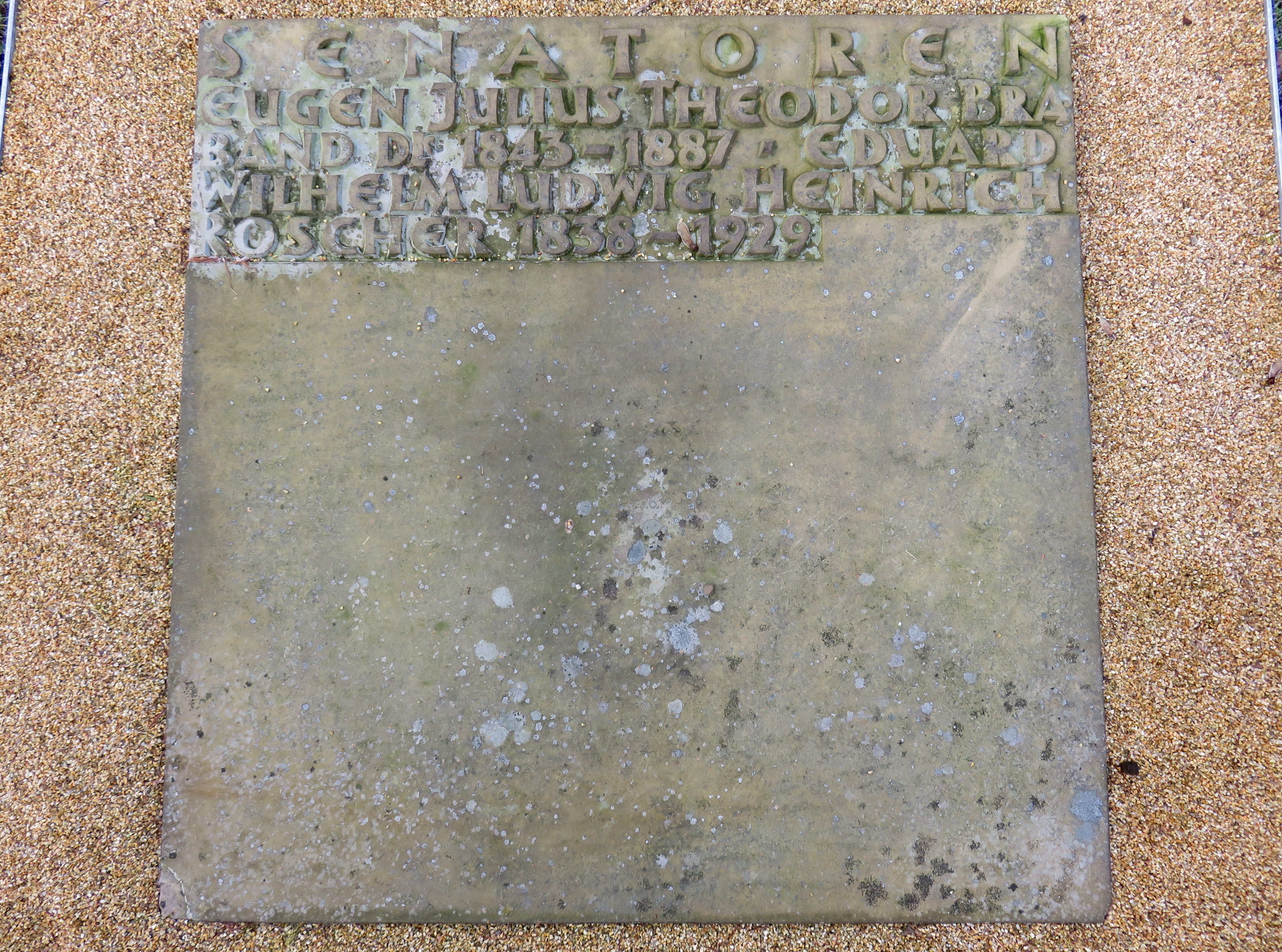 Sammelgrab Senatoren (V) im Bereich des Althamburgischen Gedächtnisfriedhofs auf dem Hamburger Friedhof Ohlsdorf zu Ehren von unter anderem Theodor Braband.